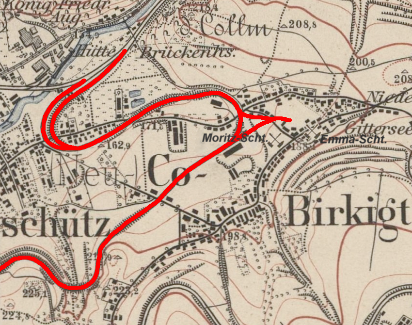 Topographische Karte (Äquidistantenkarte) Sachsen, Ausschnitt Dresden Blatt 66, ,1:25000,1904, Kohlebahn in Birkigt.